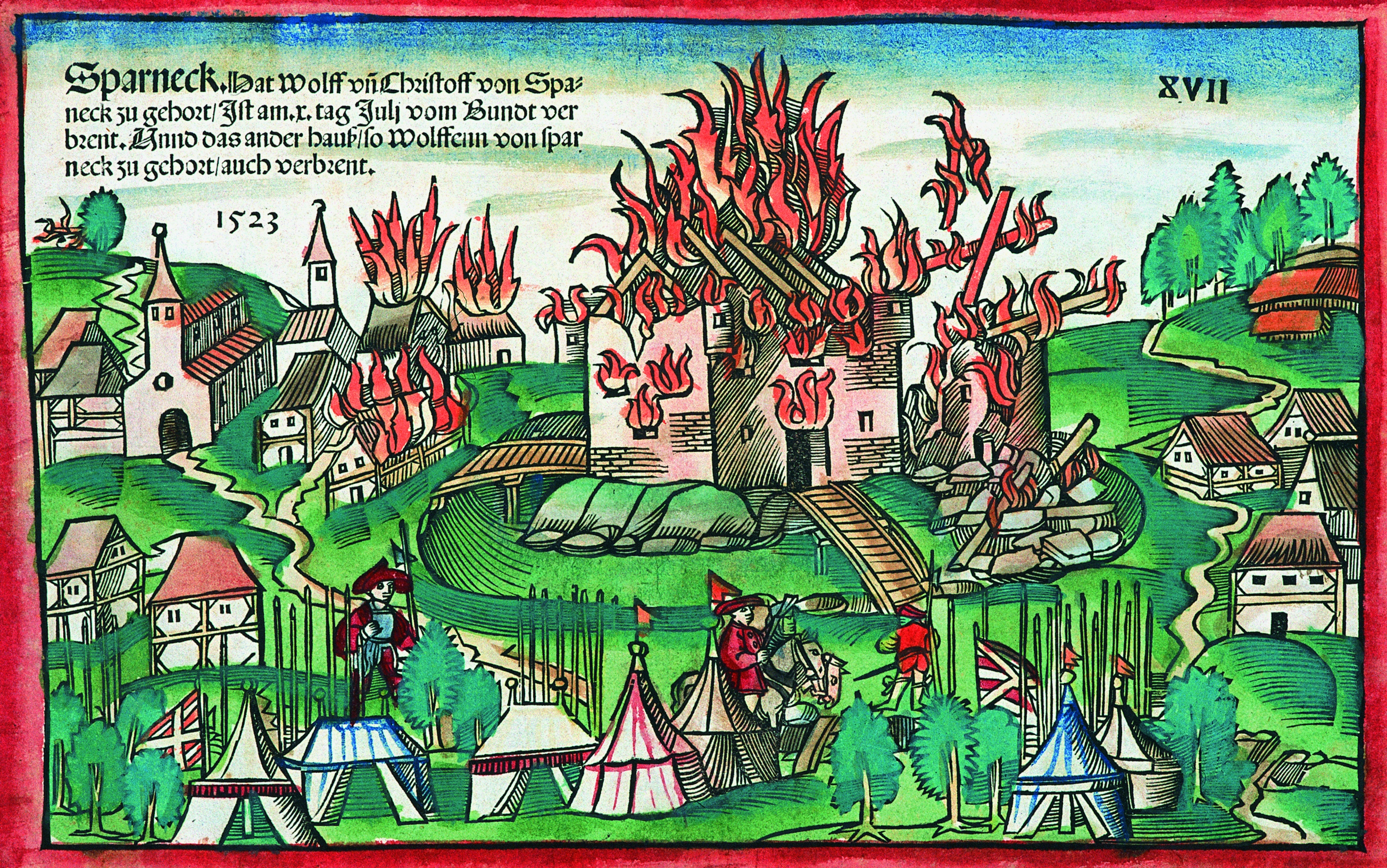 Bild aus dem Burgenbuch der Staatsbibliothek Bamberg, Staatsbibliothek Bamberg, RB.H.bell.f.1